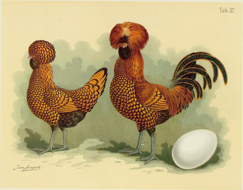 Paduaner-Huhn. Gallus dom. barbato cristatus patavinus. Polish-fowl. Poule de Padone.